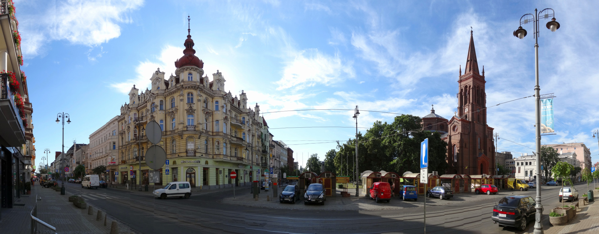 Ulica Gdańska w Bydgoszczy